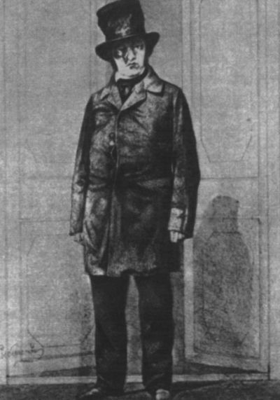 П. Садовский в роли Расплюева. Свадьба Кречинского. Малый театр. 1855